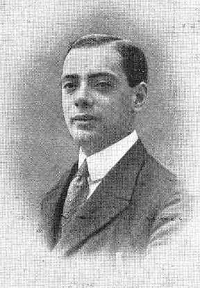 José Portal Fradejas, fotografía en Vida Gallega 1922